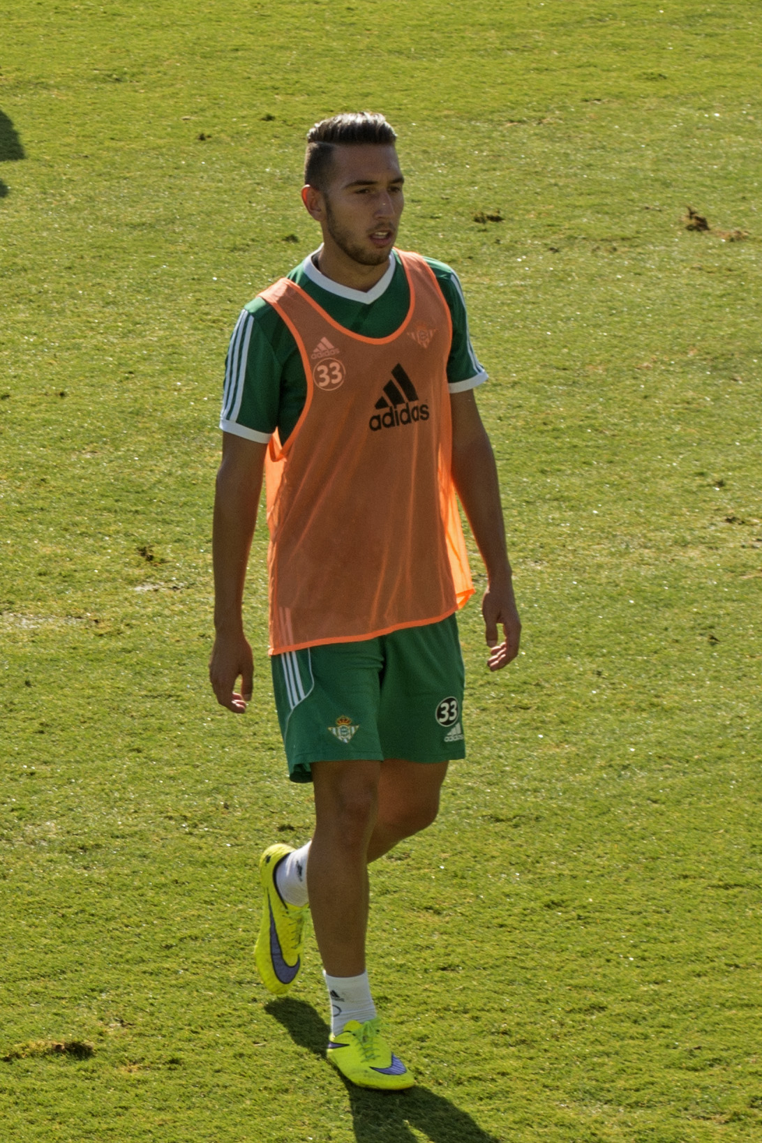 Francisco Varela, futbolista del Real Betis en 2015. Entrenamiento en la ciudad deportiva Luis del Sol